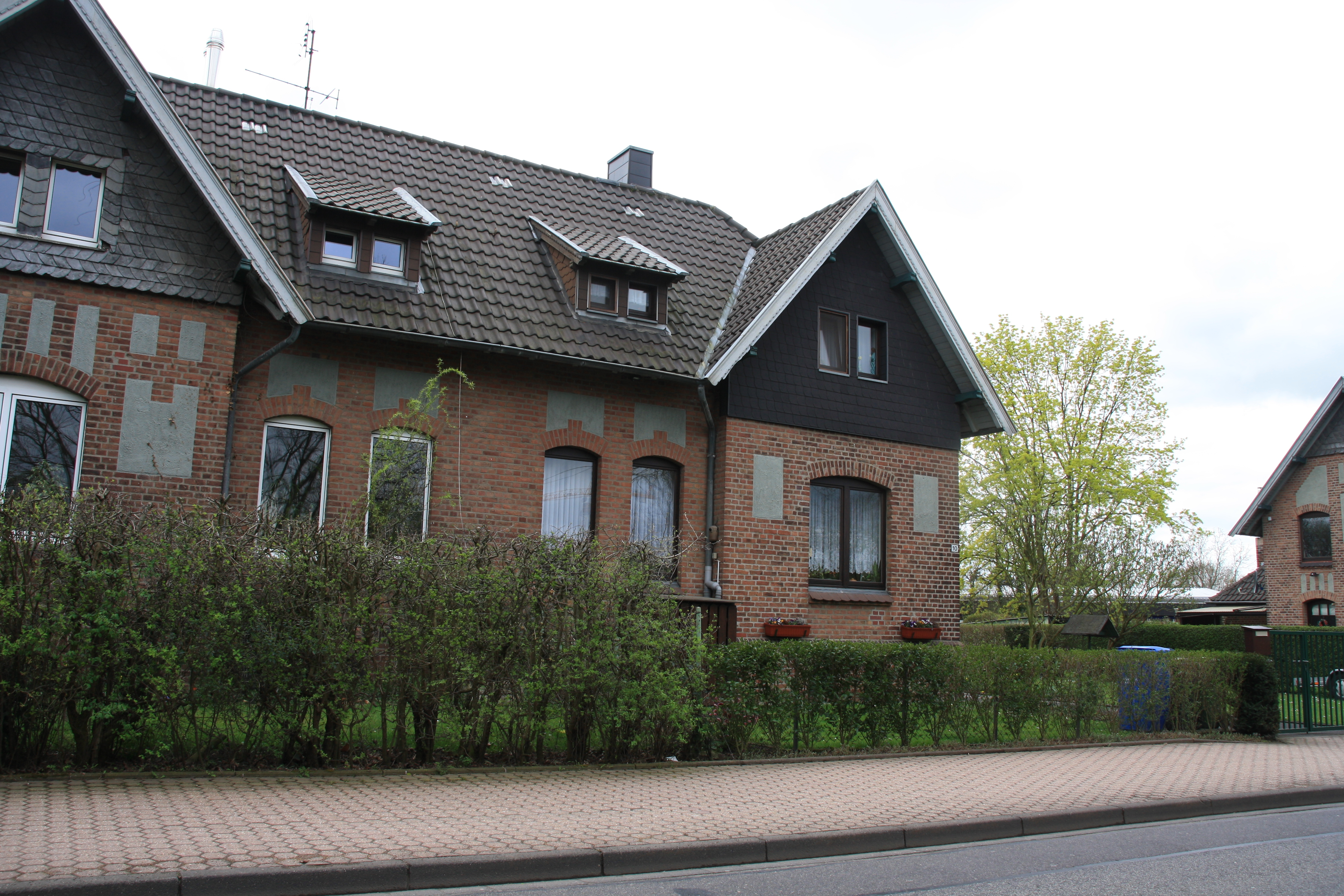 Doppelhaus Heerweg 10-12 in Düren